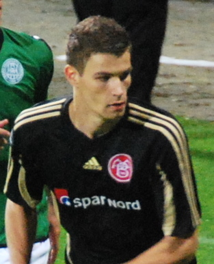 Fodboldspilleren Nicklas Helenius fra AaB. Her i pokalkampen imellem Viborg FF og AaB på Viborg Stadion.